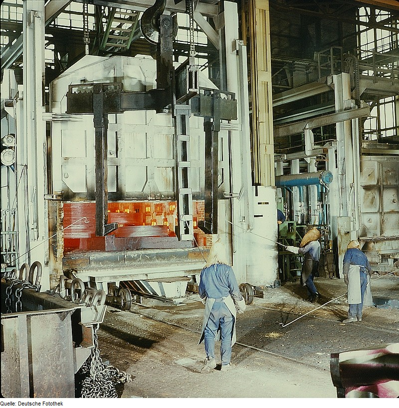 Original image description from the Deutsche Fotothek Metallurge für Walzwerktechnik